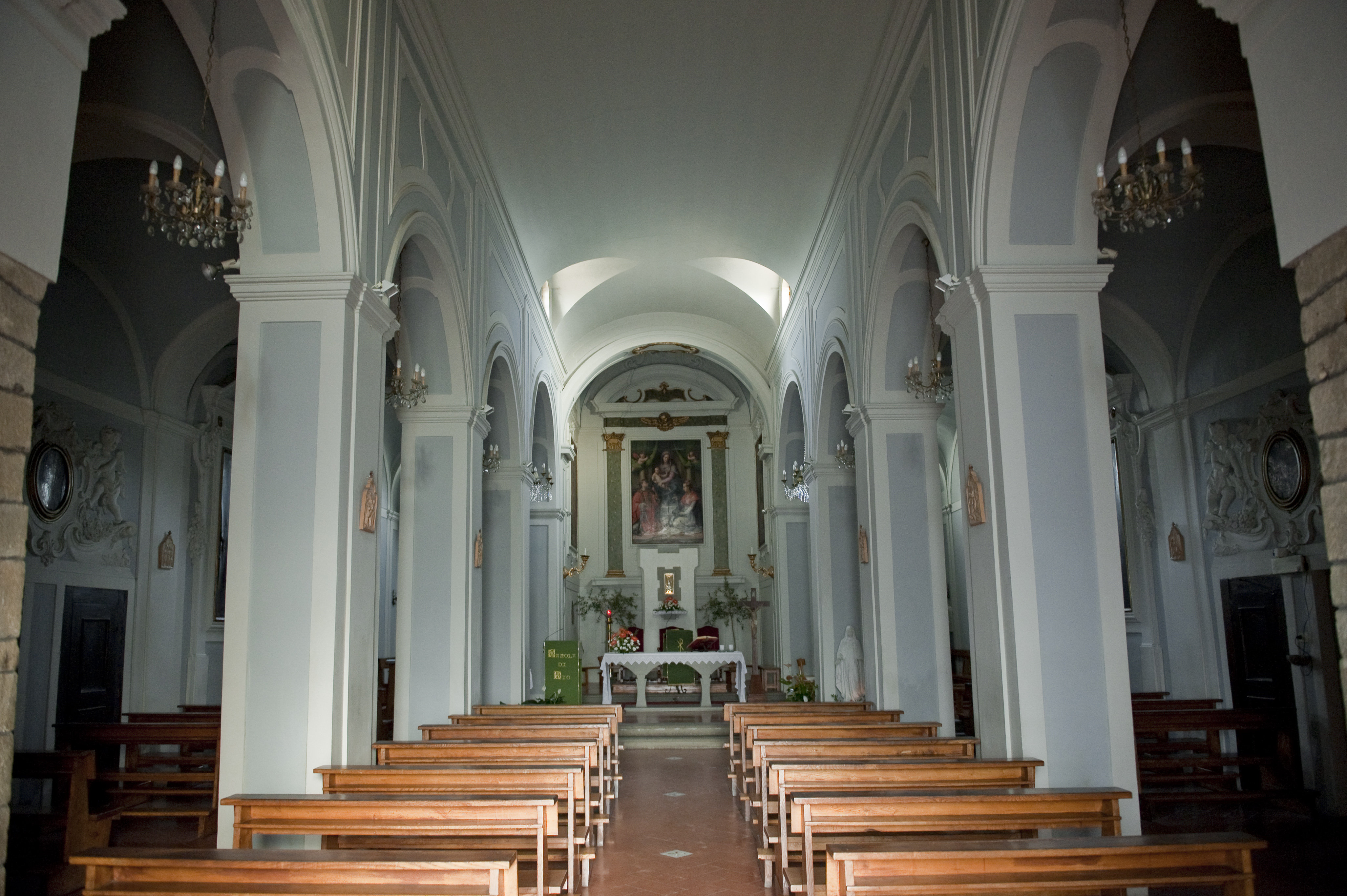 Interno della pieve di Santa cecilia a Decimo